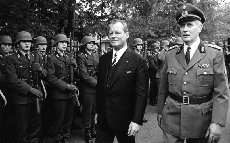 22.10.1969 Amtseinführung von Bundeskanzler Willy Brandt